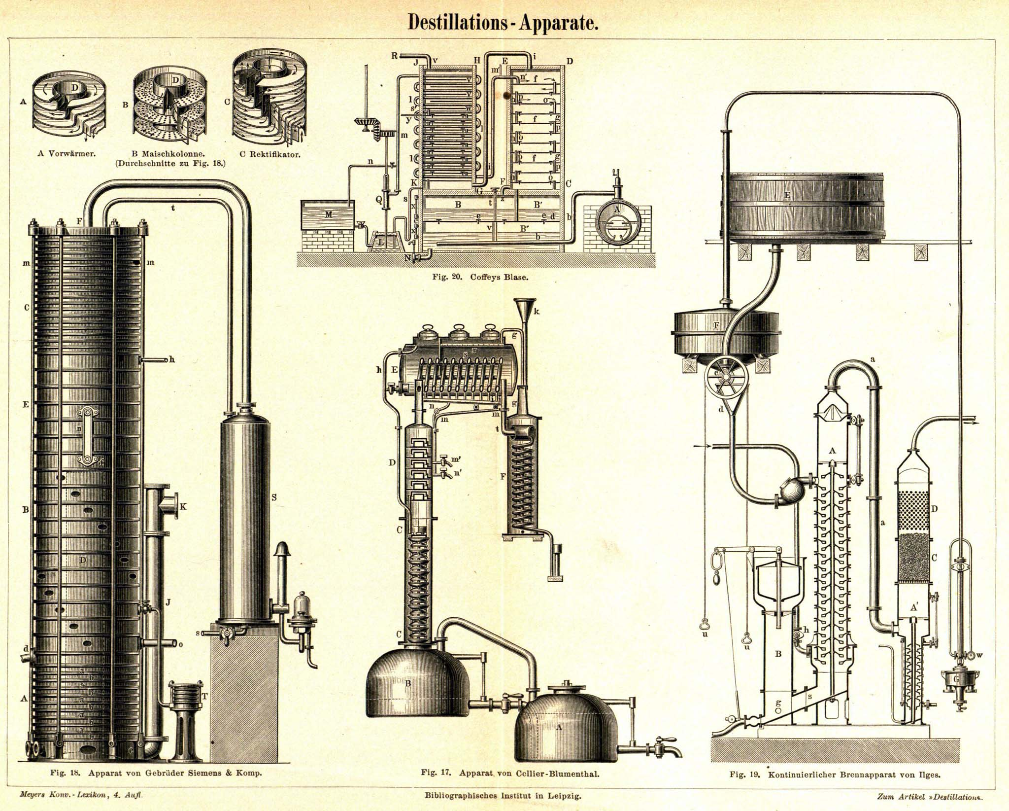 Bildtafel „Destillations-Apparate“